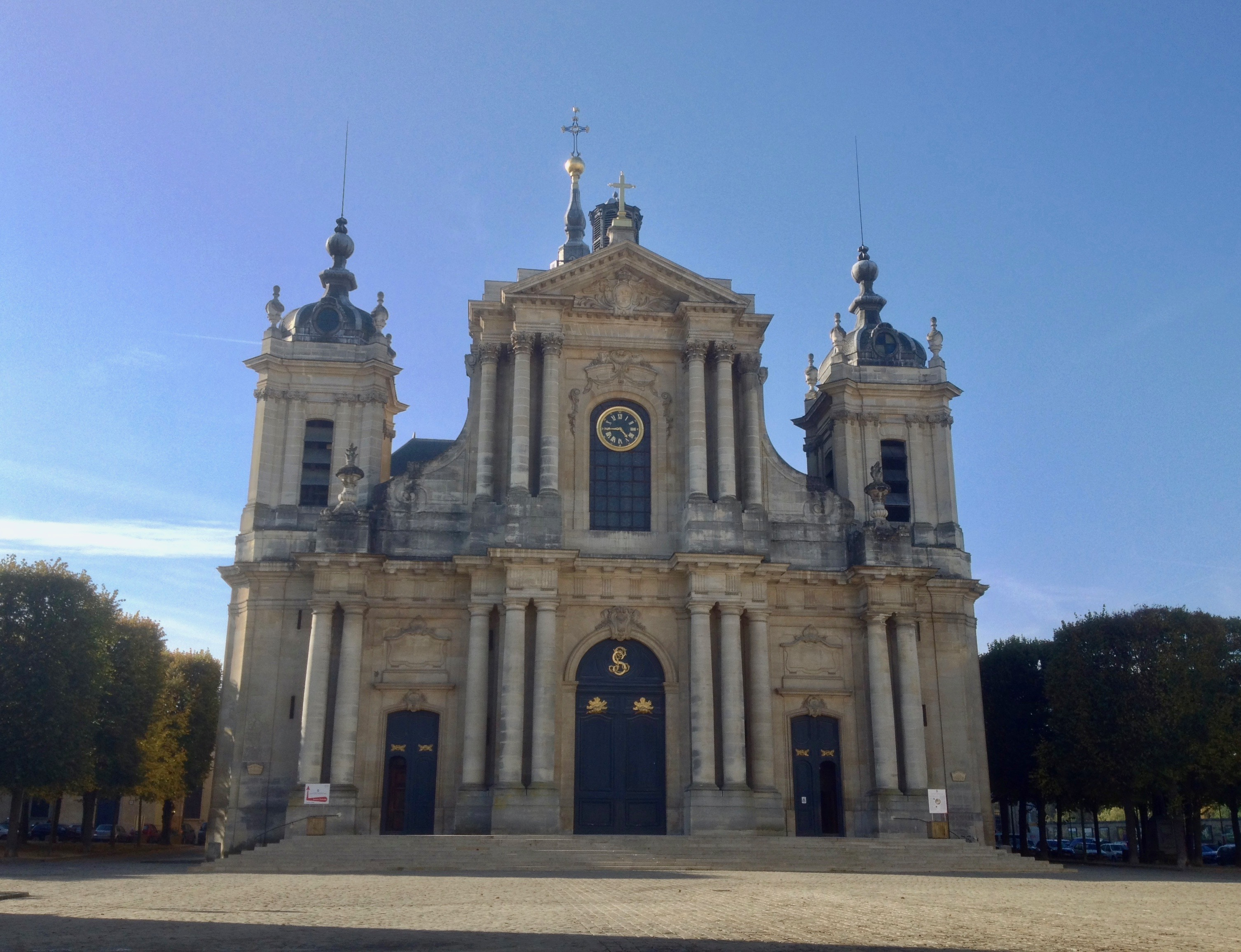 Cathédrale Saint-Louis de Versailles